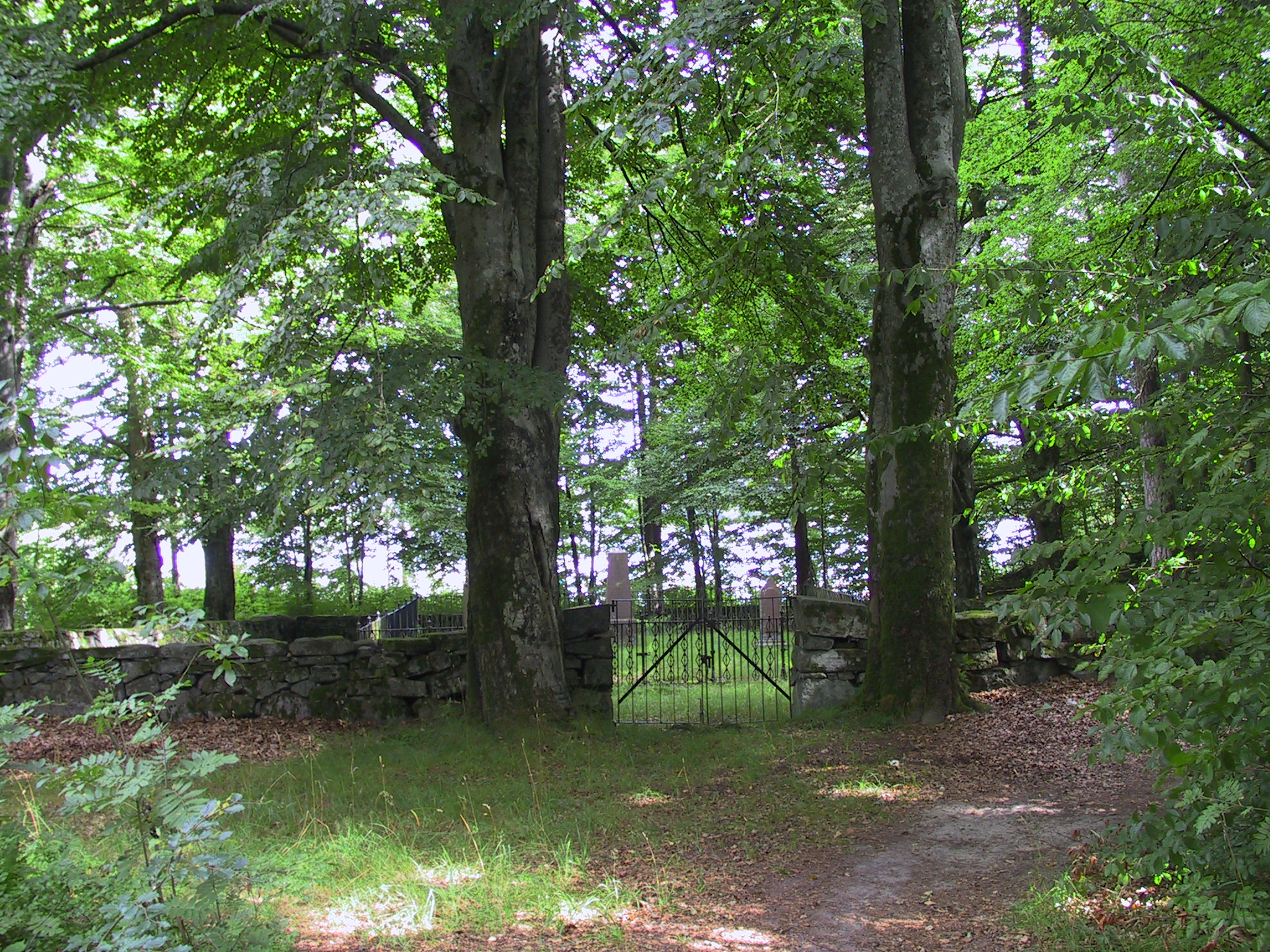 Gravstedet på Tangen, Hisøy i Arendal